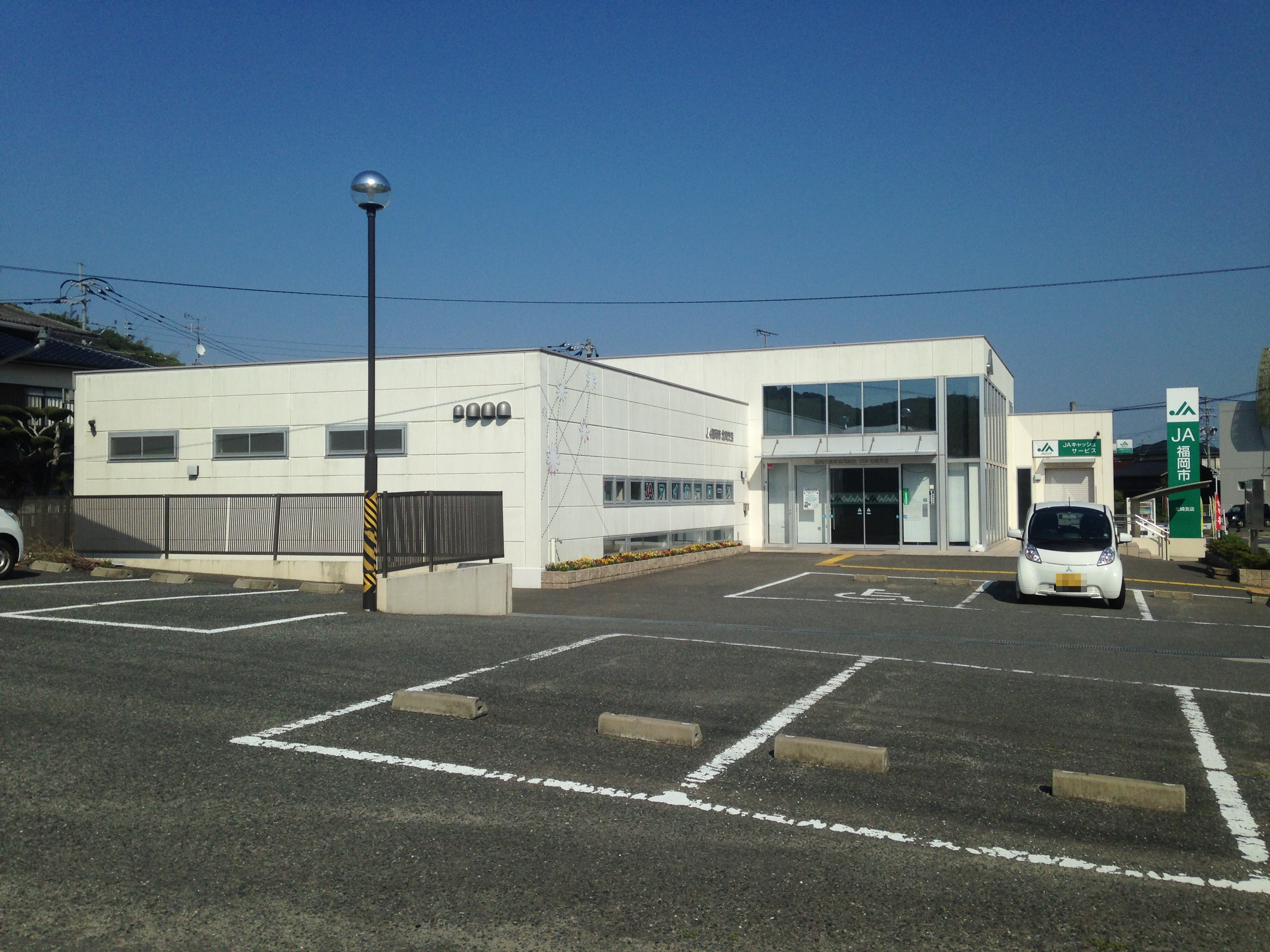 JA福岡市北崎支店